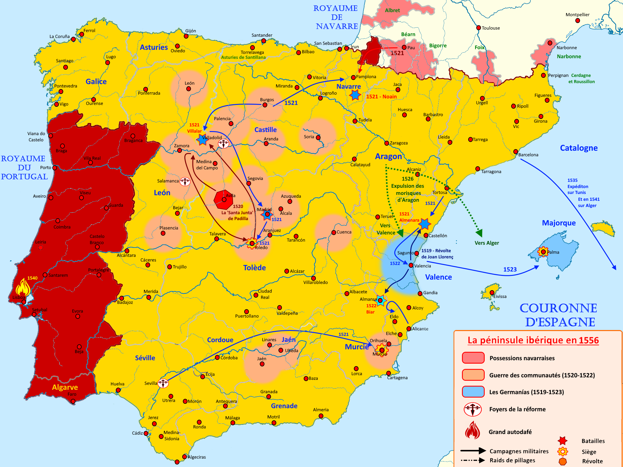 Carte de la péninsule ibérique sous le règne de Charles Quint (1516-1556)